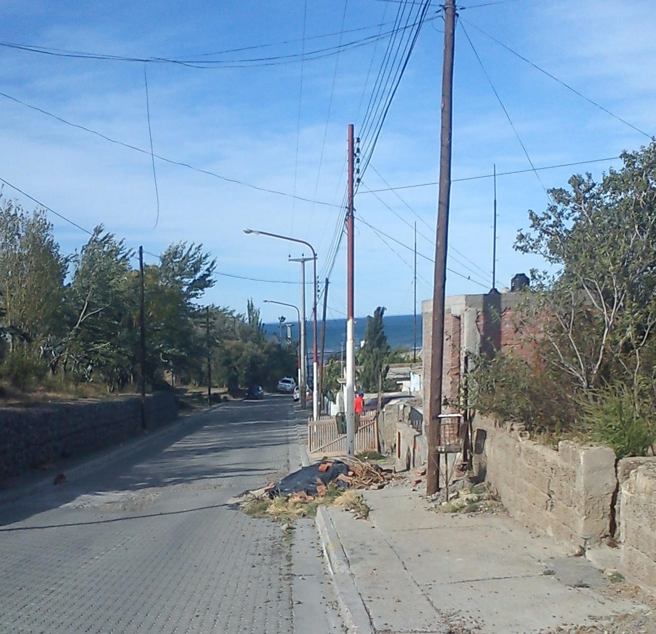 Avda. Gardel